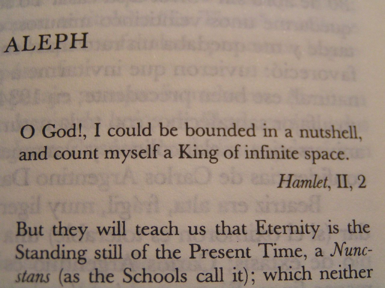 "Cada cosa (la luna del espejo, digamos) eran infinitas cosas, porque yo claramente la veía desde todos los puntos del universo." El Aleph - Jorge Luis Borges Sin duda mi relato favorito.